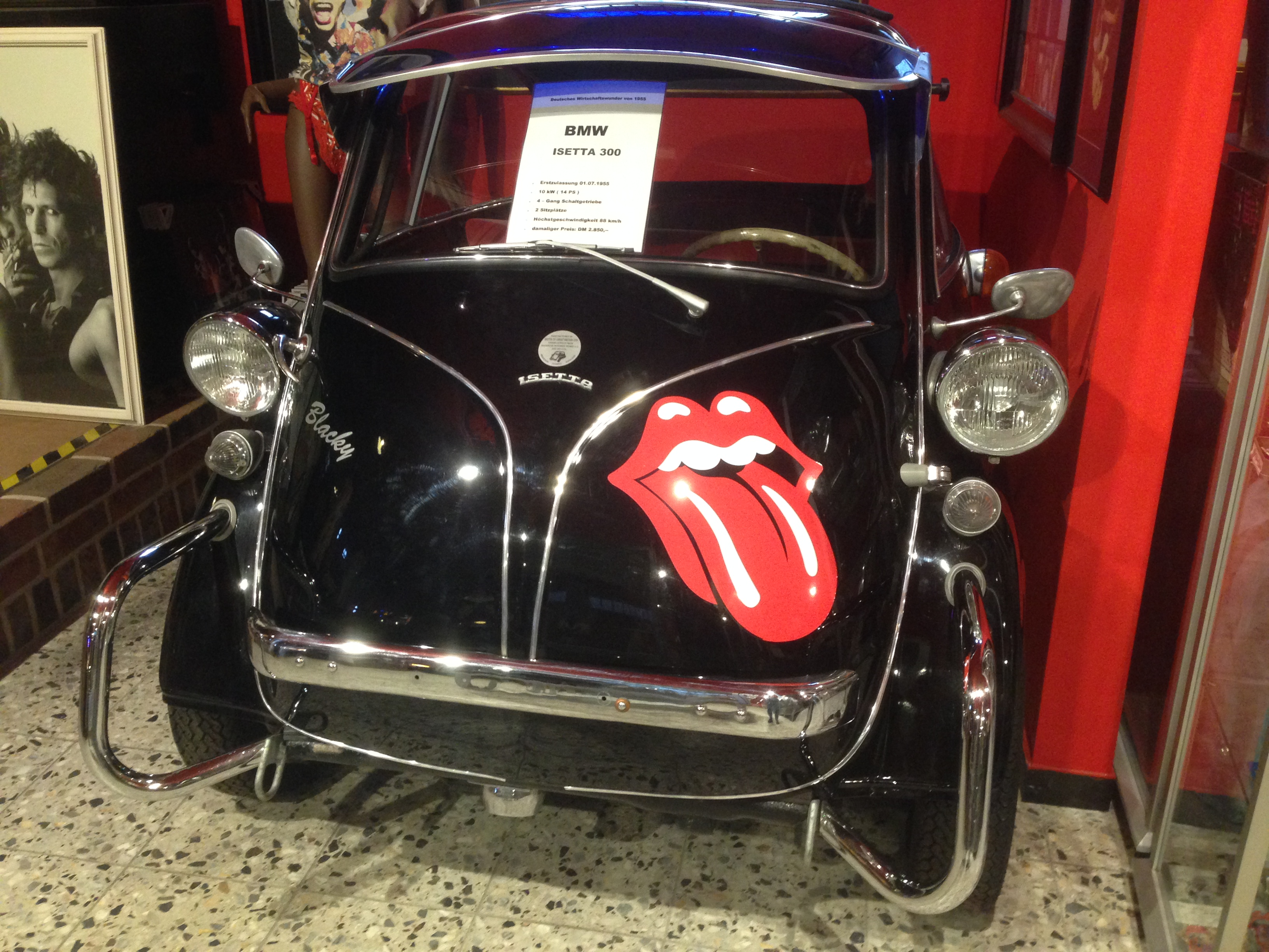 Stones Fan Museum, Lüchow, Germany